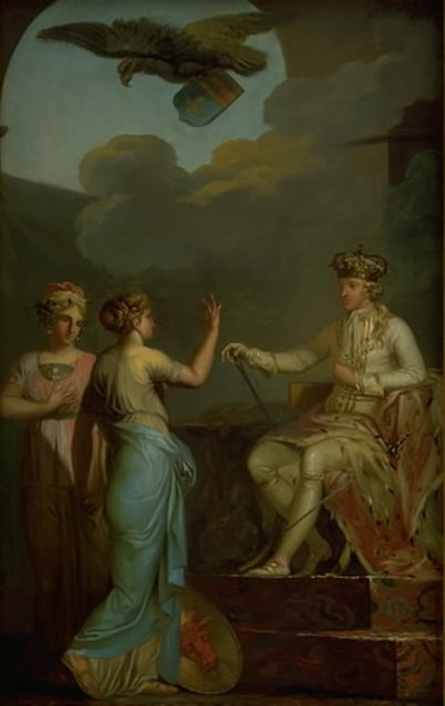 Christian VII of Denmark attributed to Nicolai Abildgaard Christian VII forener den hertugelige med den kongelige del af Holsten i 1767. 179